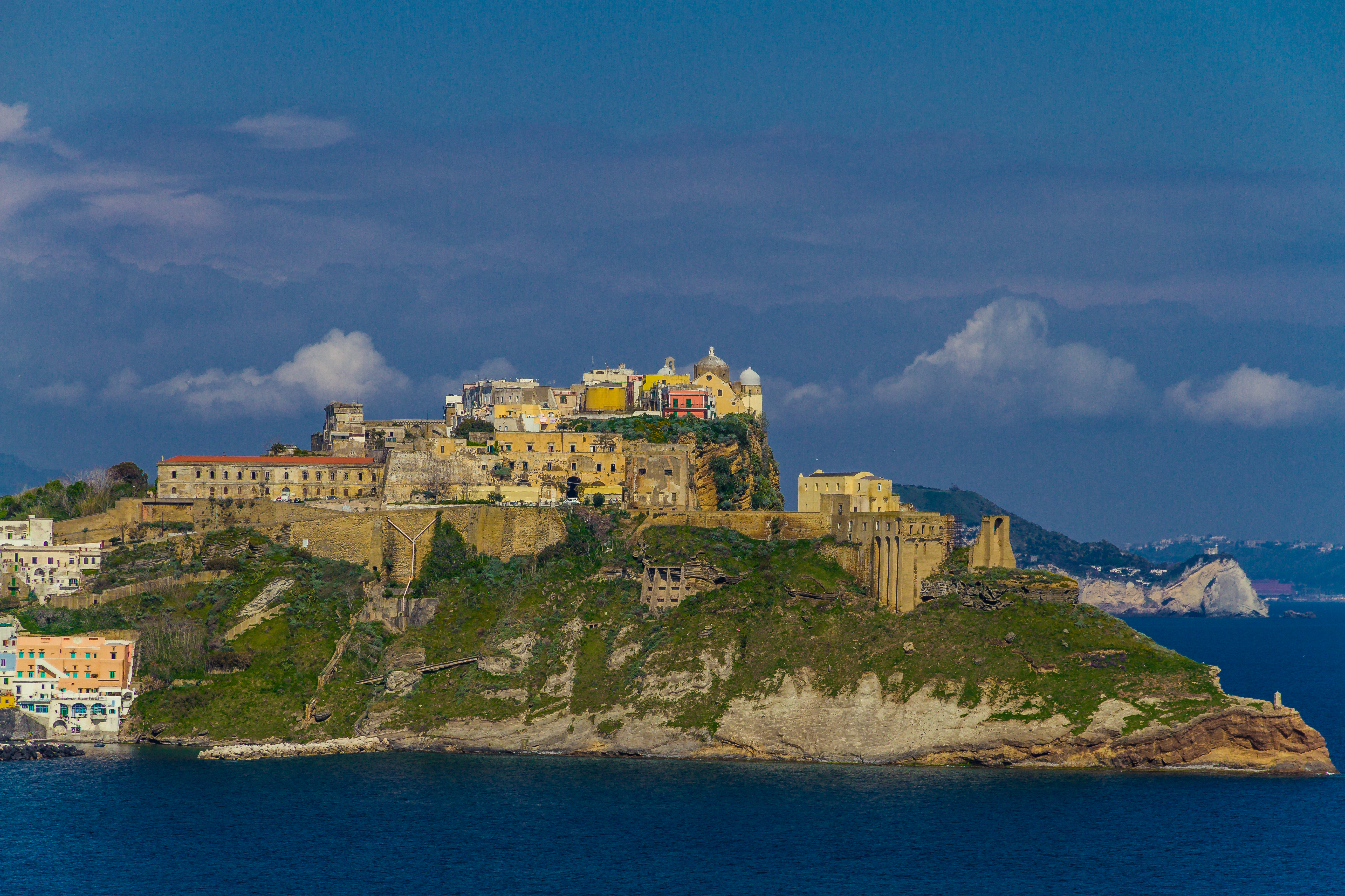 Procida